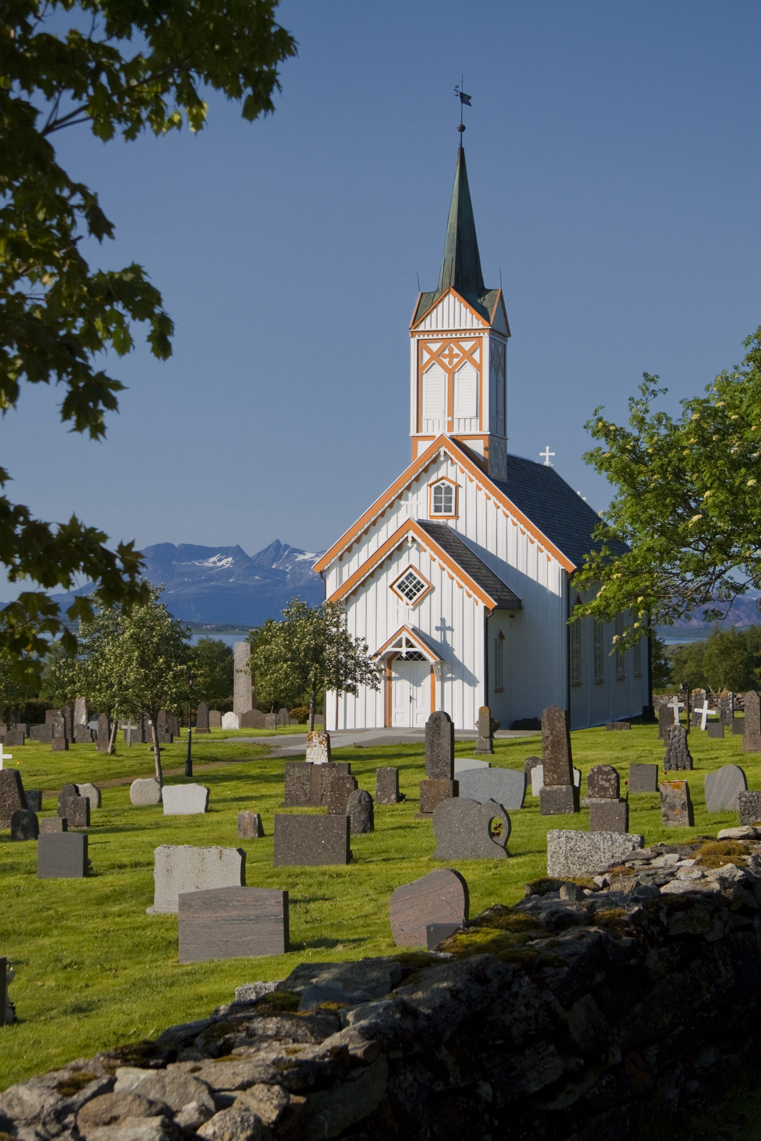 along RV17 / Kystriksveien